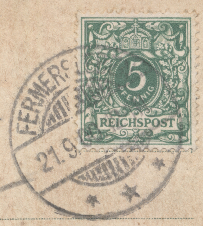 Poststempel von Fermersleben vom 21.9.1900